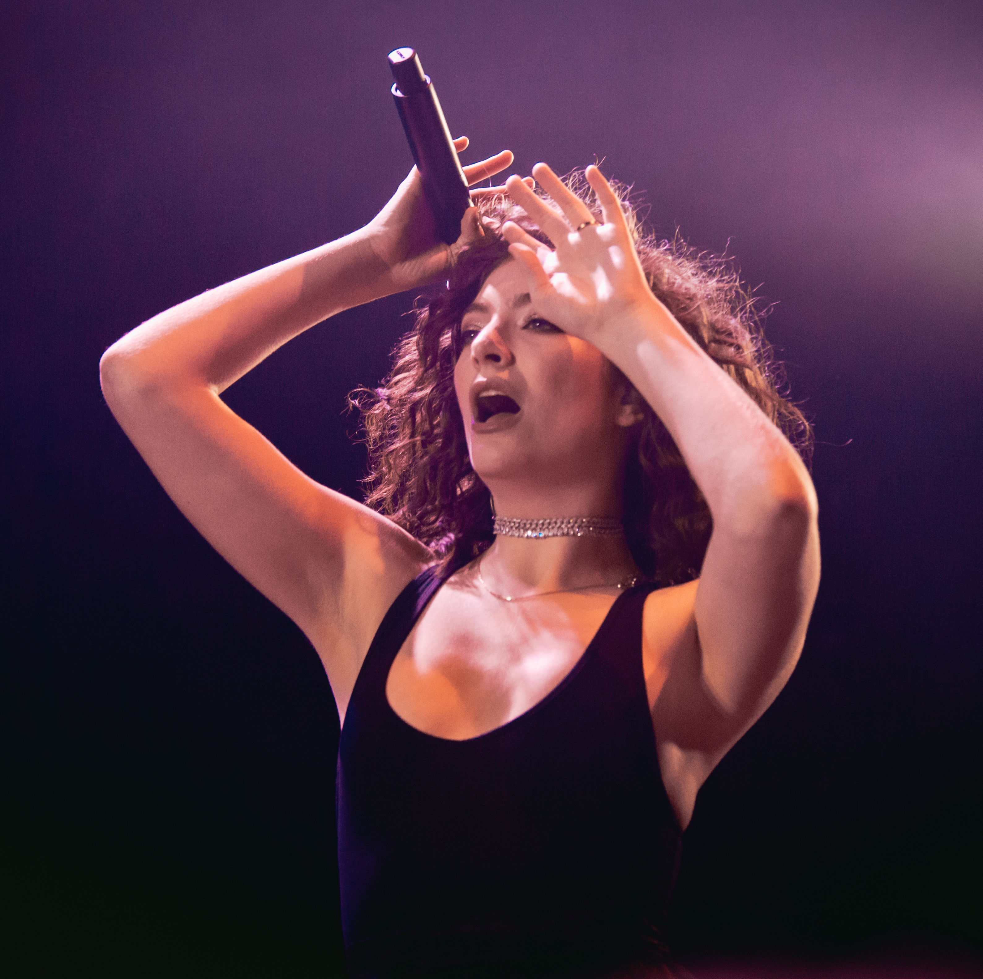 Photo: Krists Luhaers // @Kristsll